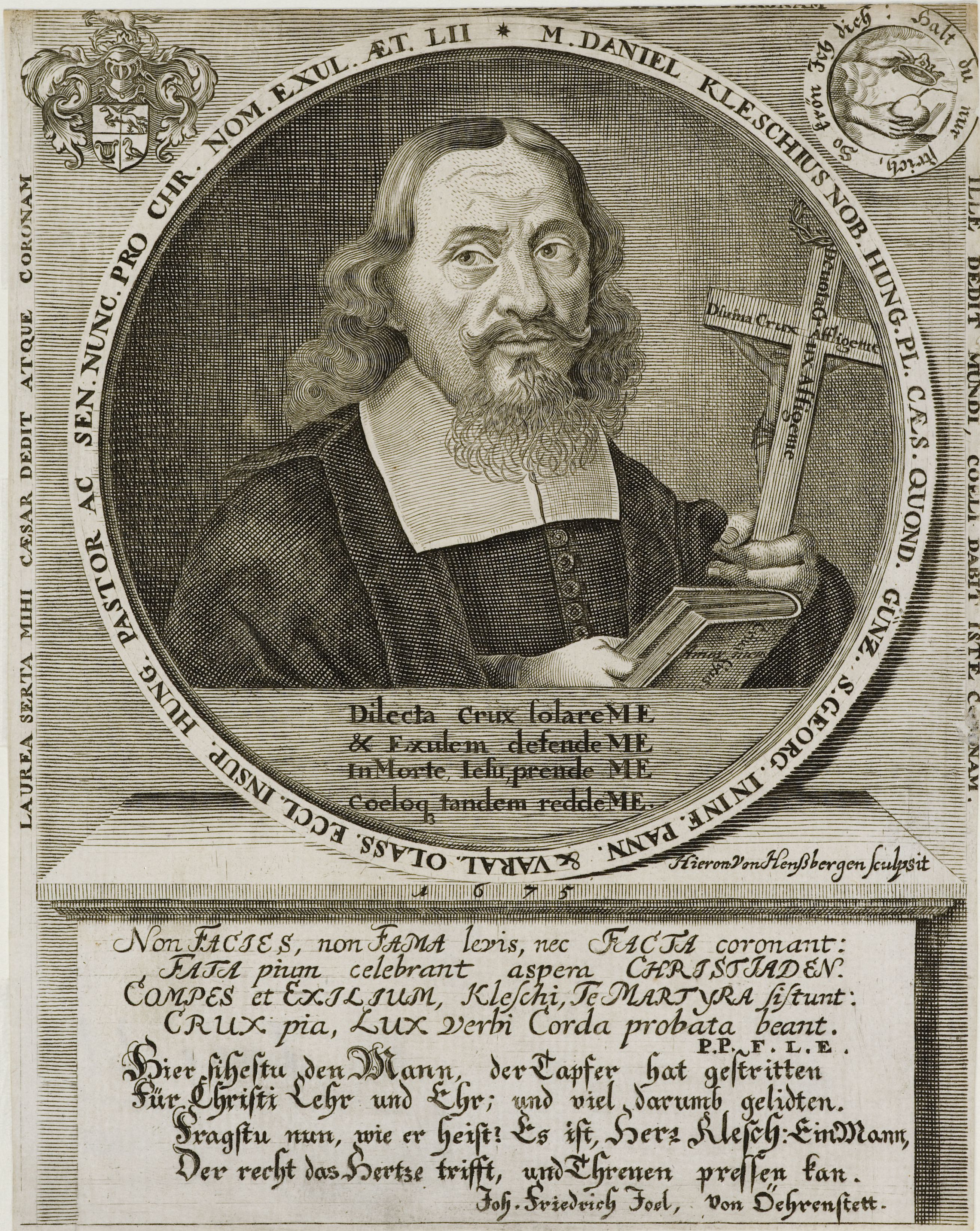 Bildnis von Daniel Klesch